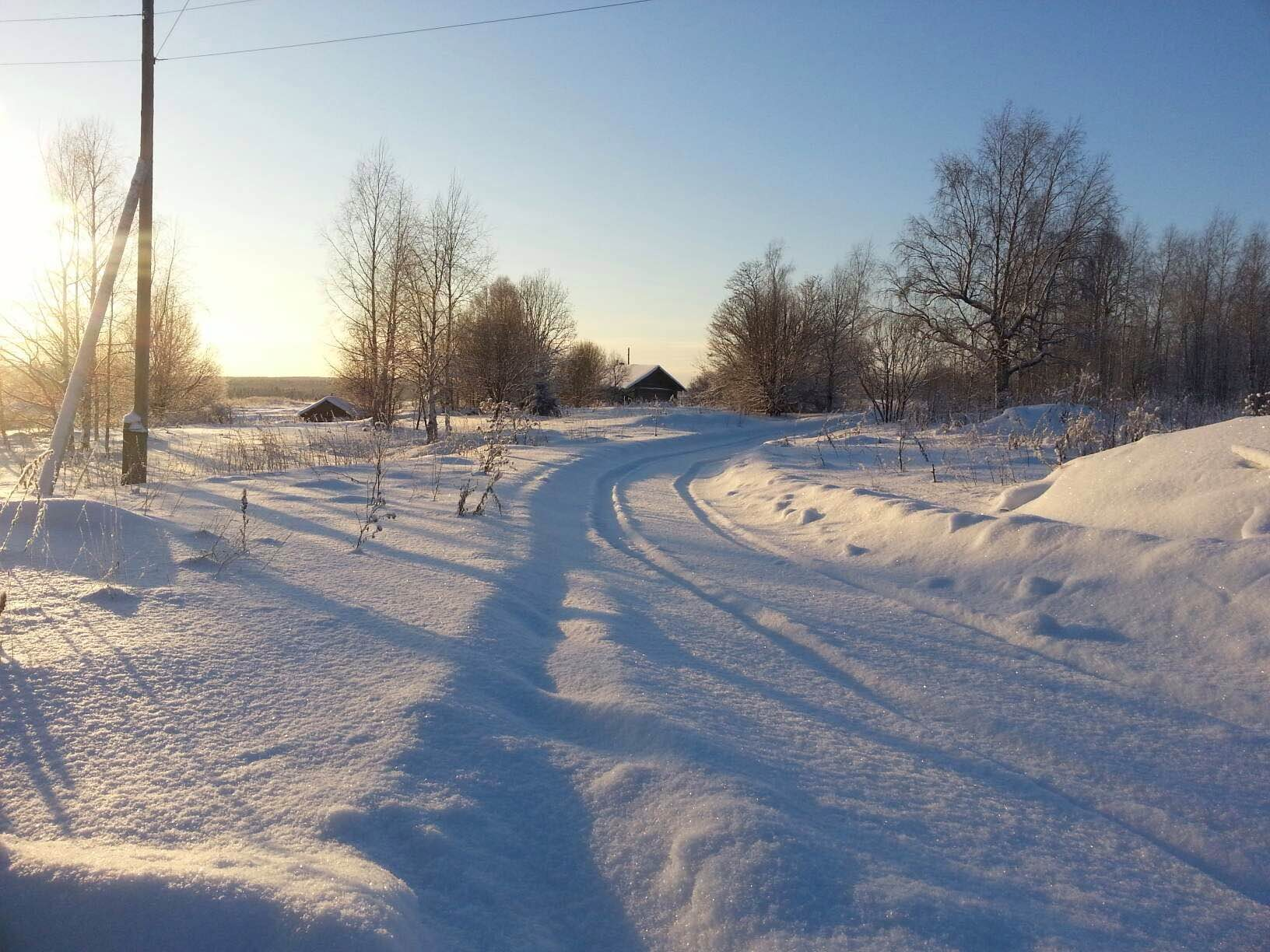 зимняя дорога в деревне Засосенье